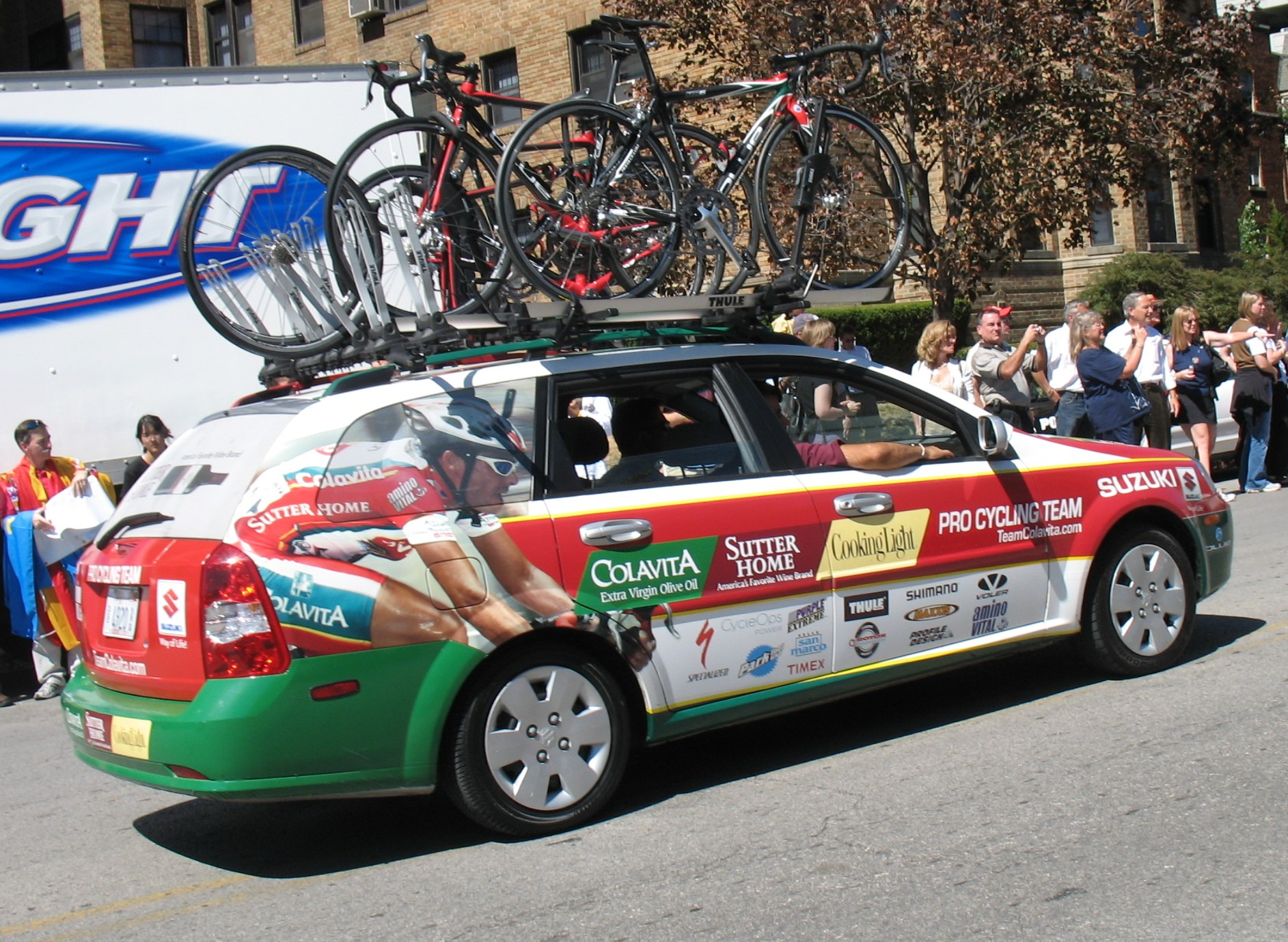 Colavita team car